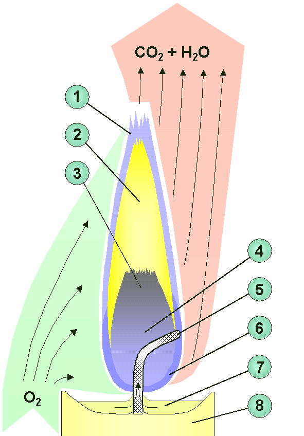 Kaarsvlam met nummers voor uitleg en aan- en afvoerstromen